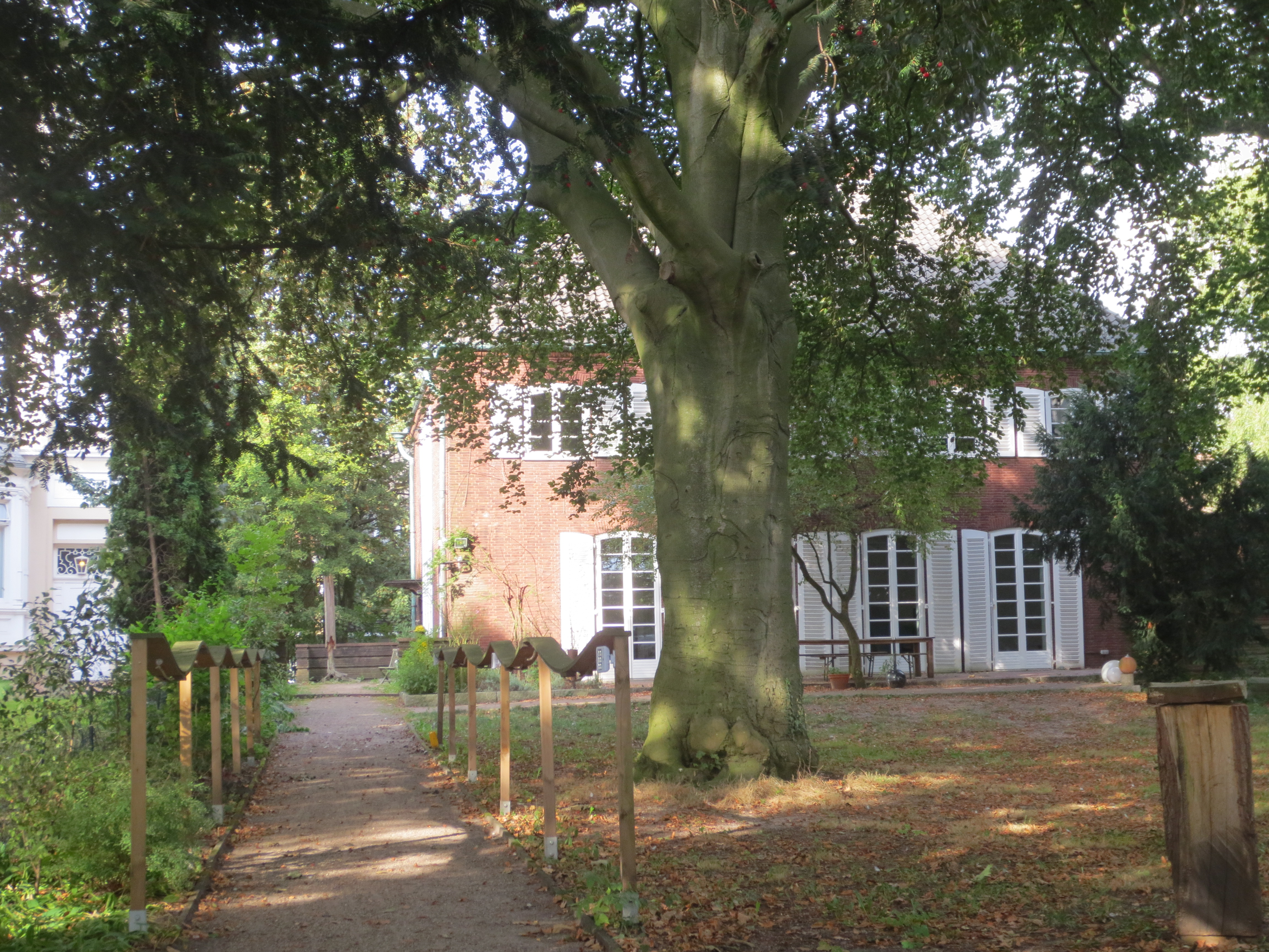 Haus Heinemann in Bremen, Osterdeich 59BDas abgebildete Objekt ist ein geschütztes Kulturdenkmal in der Freien Hansestadt Bremen, mit der Nr. 0966 beim Landesamt für Denkmalpflege registriert.